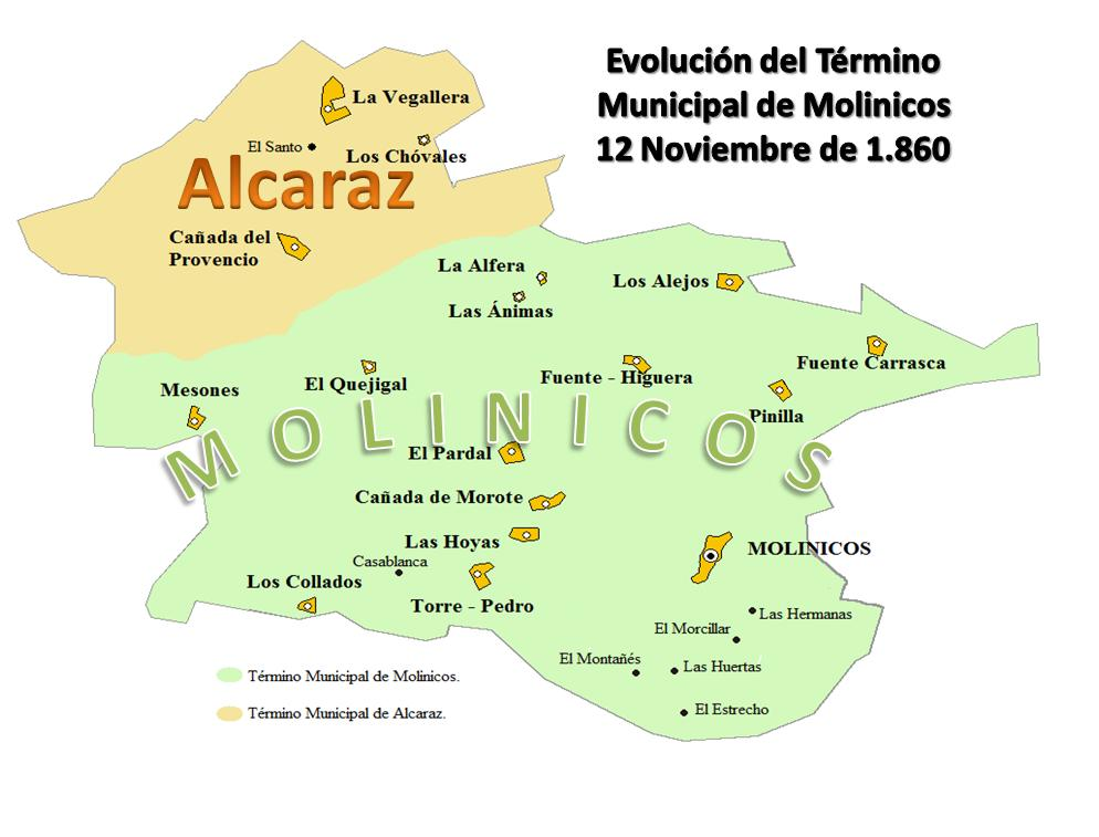 Mapa indicativo de la anexión al Término Municipal de Molinicos (Albacete- España) de la localidad de Mesones